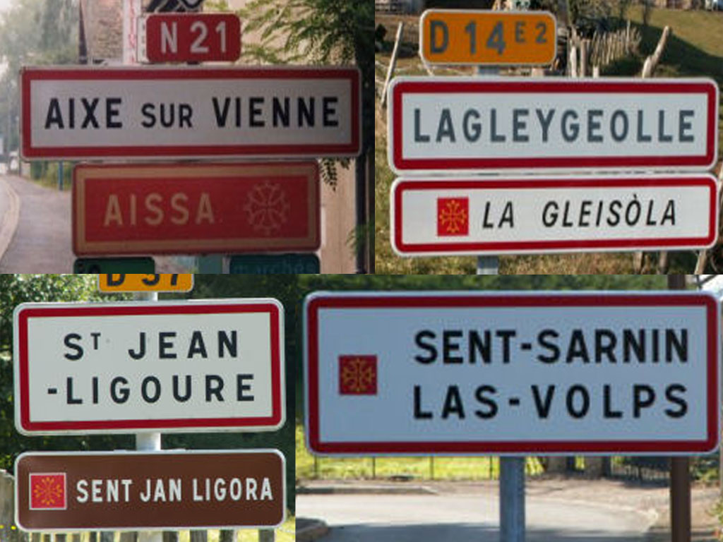 Exemples de signalisation d'entrée français-occitan en Limousin.